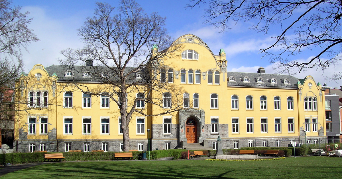 E.C. Dahls Stiftelse, Trondheim. Bygd 1908. Arkitekter: Johan Osness (fasade), Johan Christensen og Lars Solberg (plan).